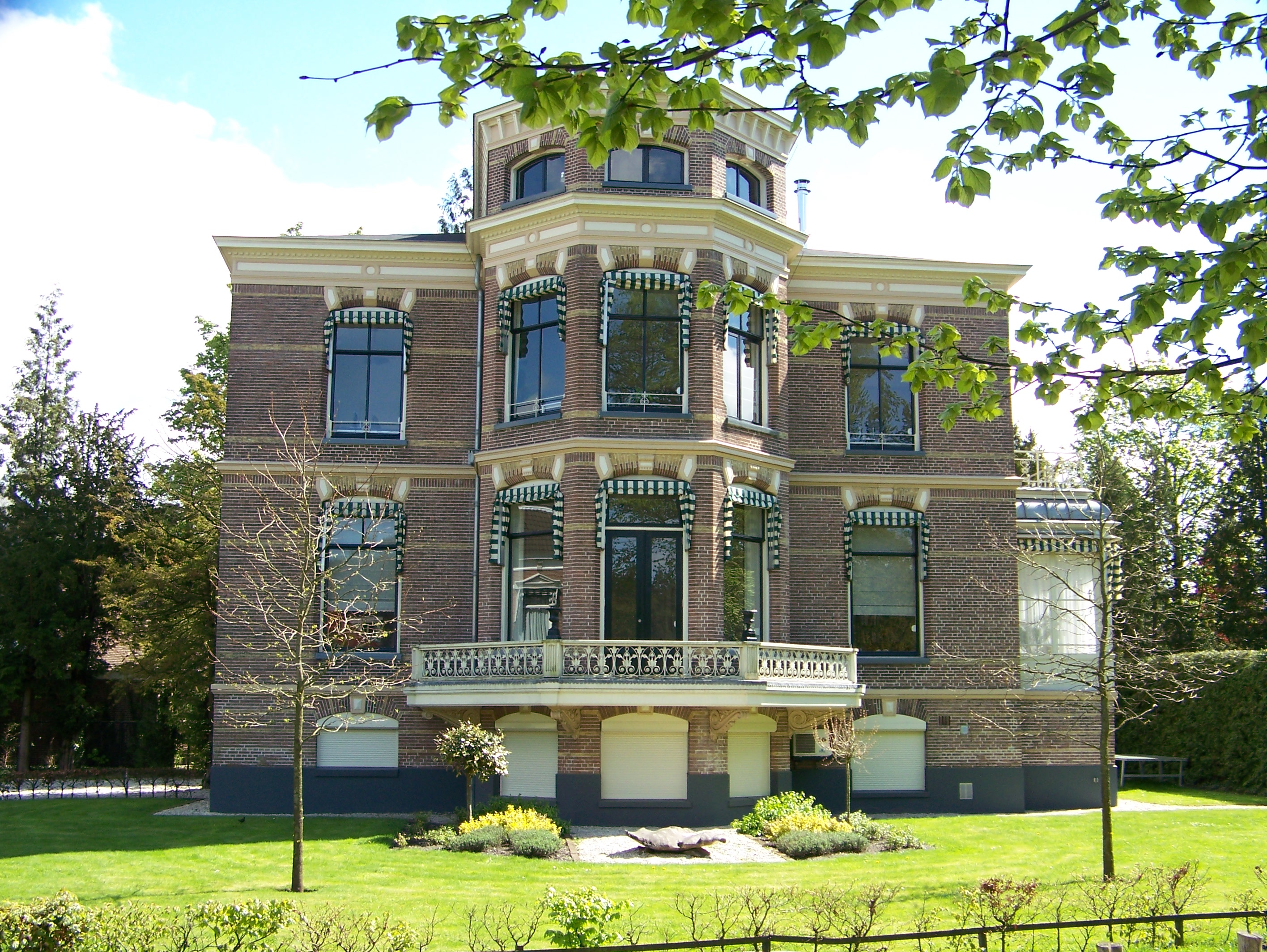 Woonhuis aan de Dr. Nassaulaan 9 in Assen, is een Rijksmonument.